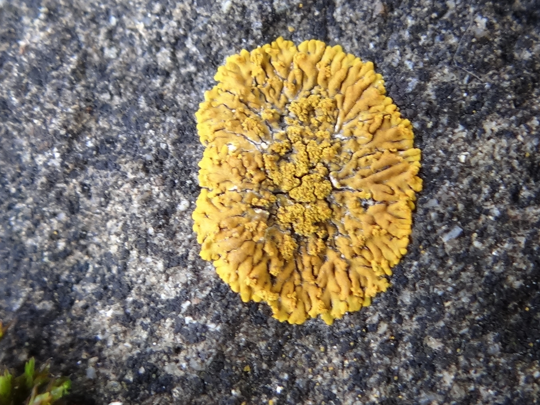 Caloplaca decipiens (location: Poland, Sidzina, powiat suski)